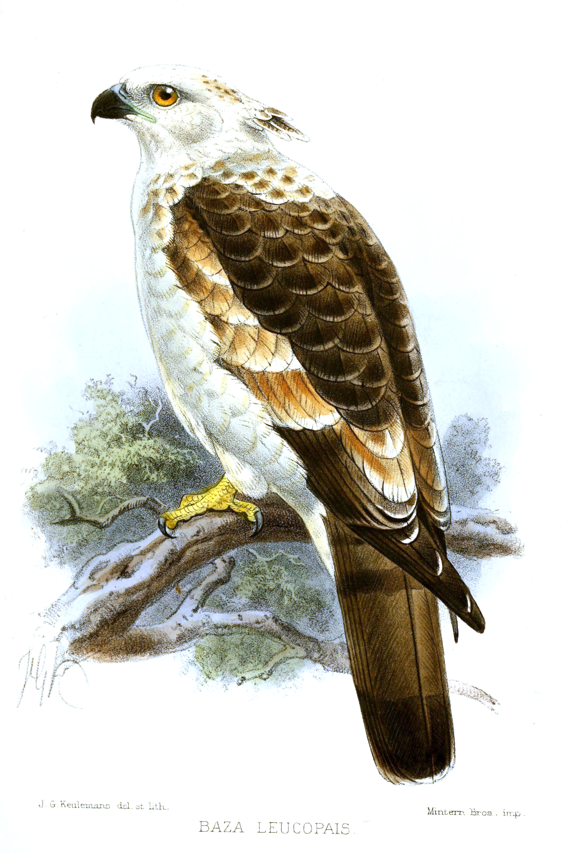 Baza leucopais (sic) = Aviceda jerdoni ?